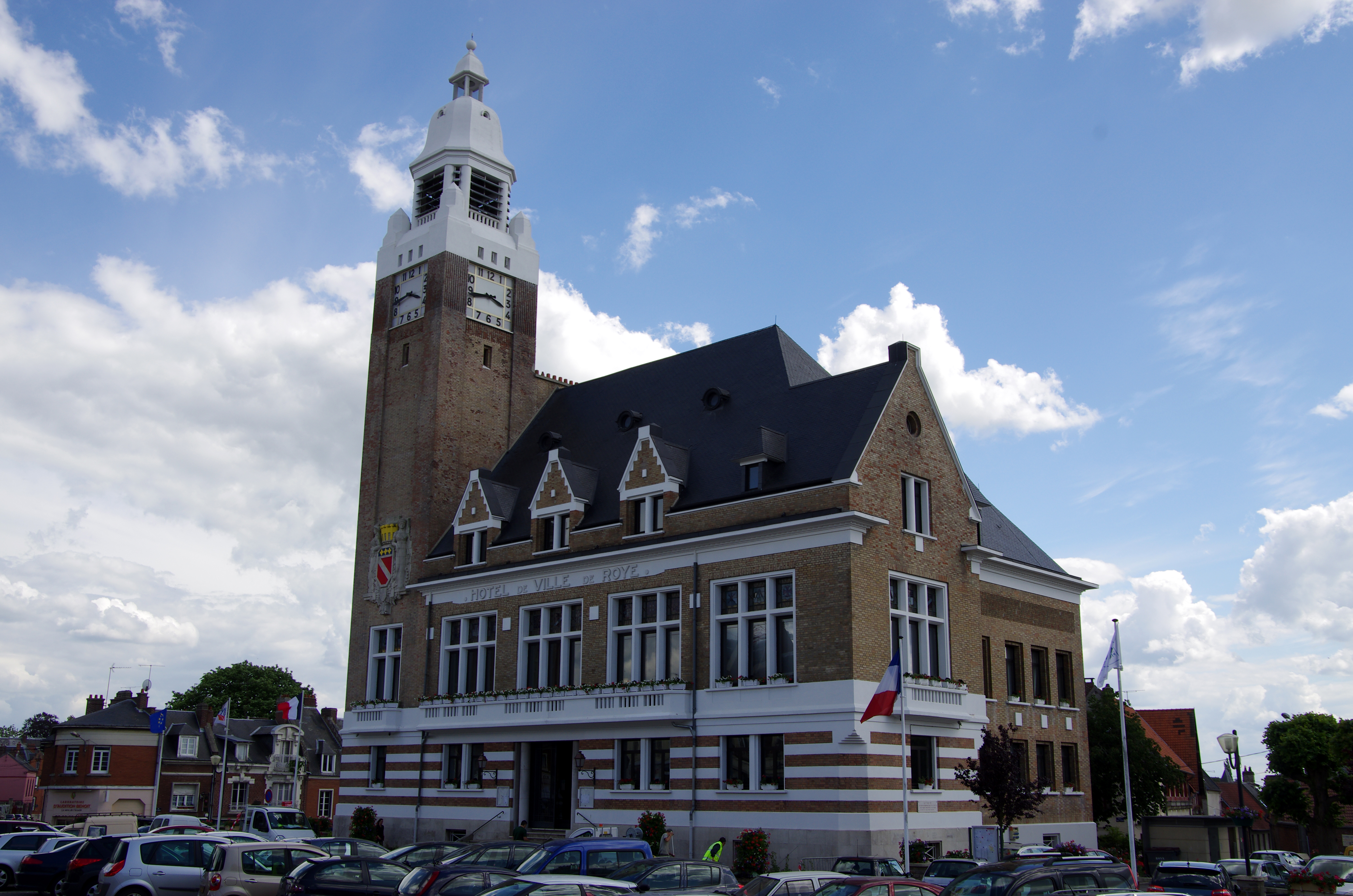 Roye (Somme, France) - L'hôtel-de-ville. .